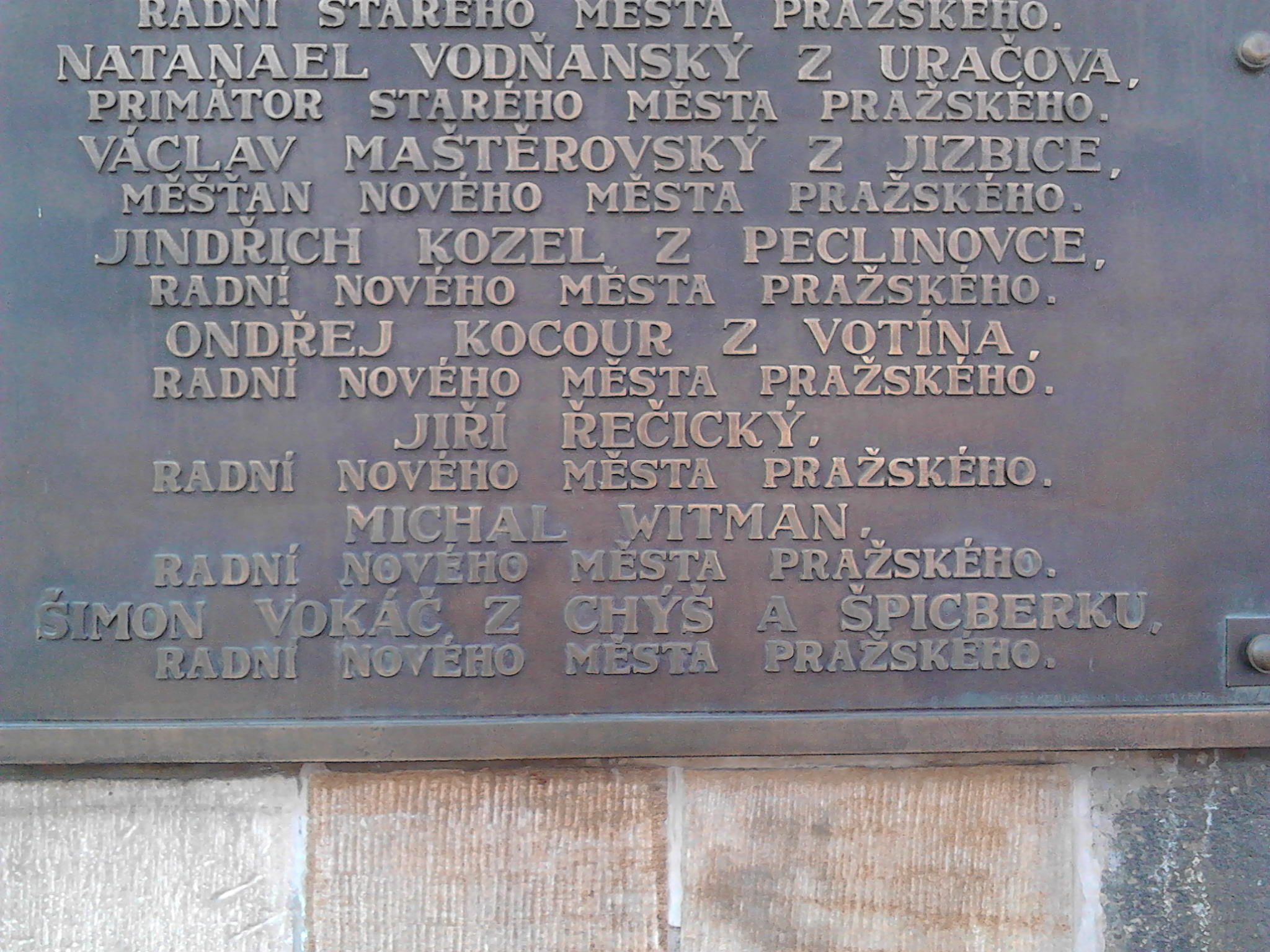 Pamětní deska na Staroměstské radnici - detail jména Simeona Vokáče